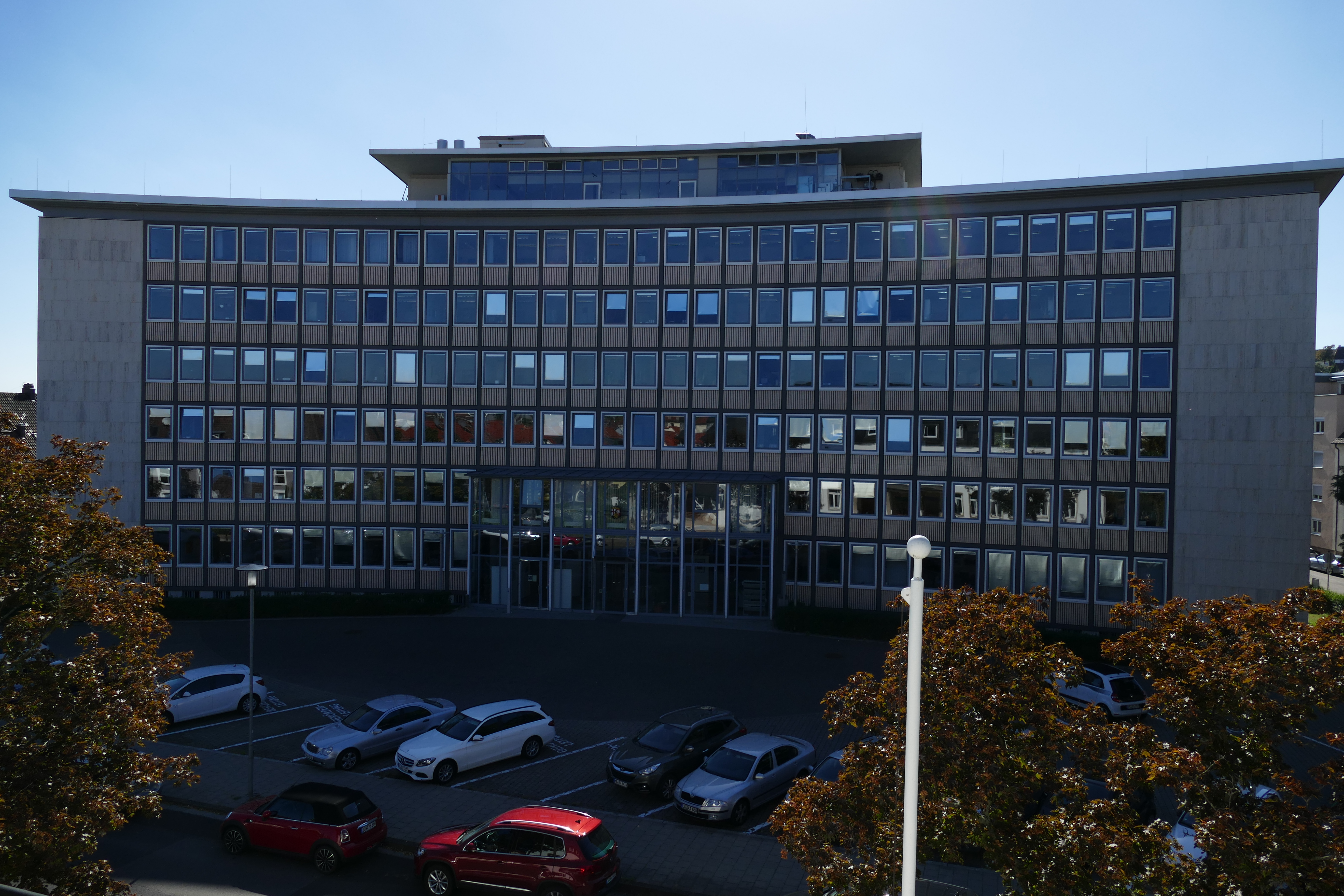 Friedrich-Ebert-Straß14-Neustadt-Weinstraße